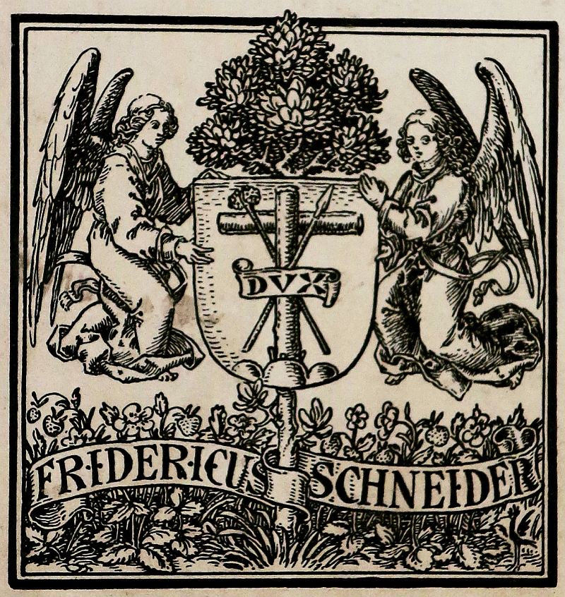 Exlibris des Mainzer Geistlichen Friedrich Schneider. In: Serarius, Nikolaus: Rervm Mogvntiacarvm ... Frankfurt: Sande, 1722. Wissenschaftliche Stadtbibliothek Mainz. Signatur: Mog:2°/20 b, 1